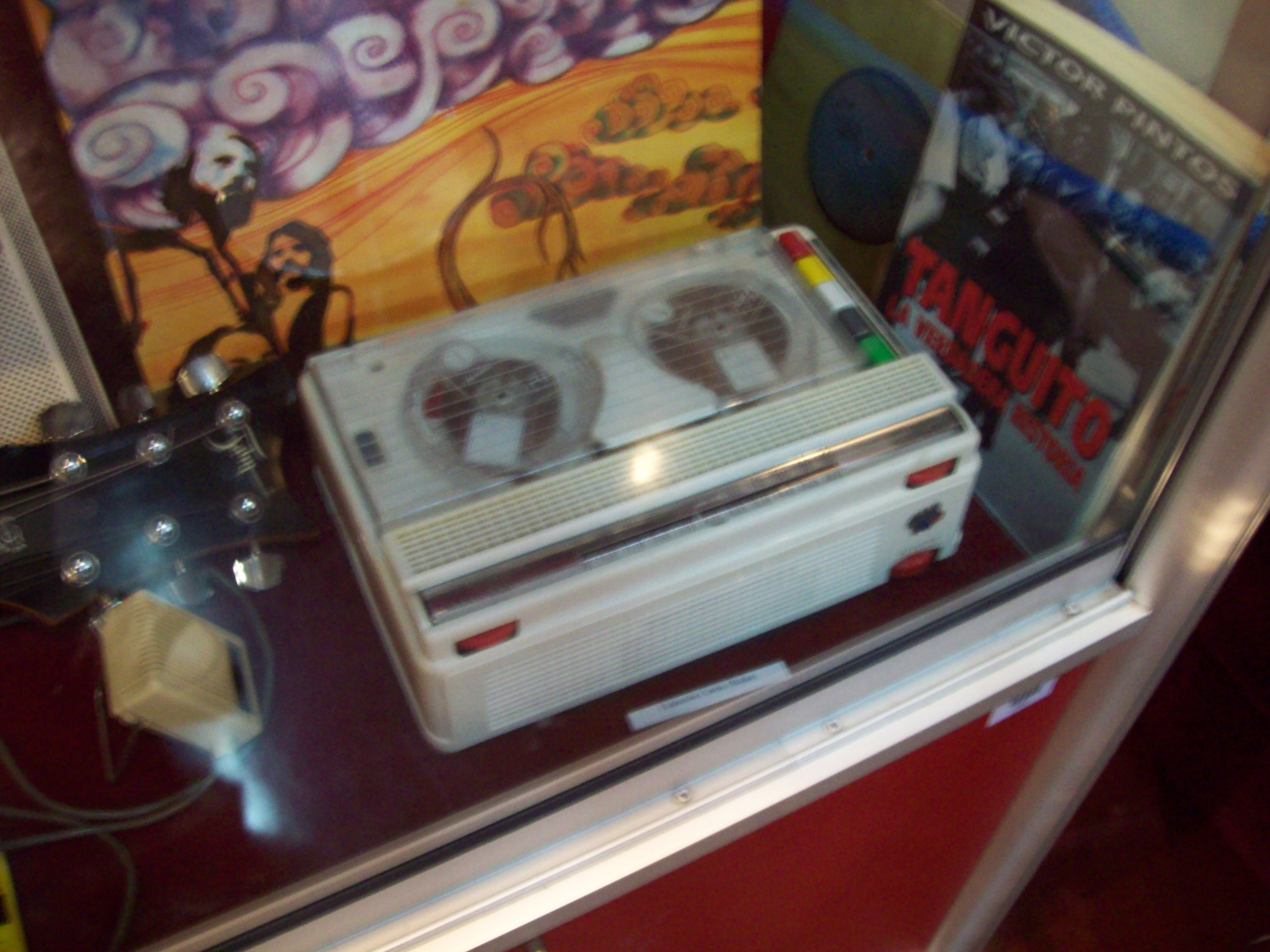 Grabador Geloso, en la muestra de la Biblioteca Nacional Pidamos peras a Jorge Álvarez.